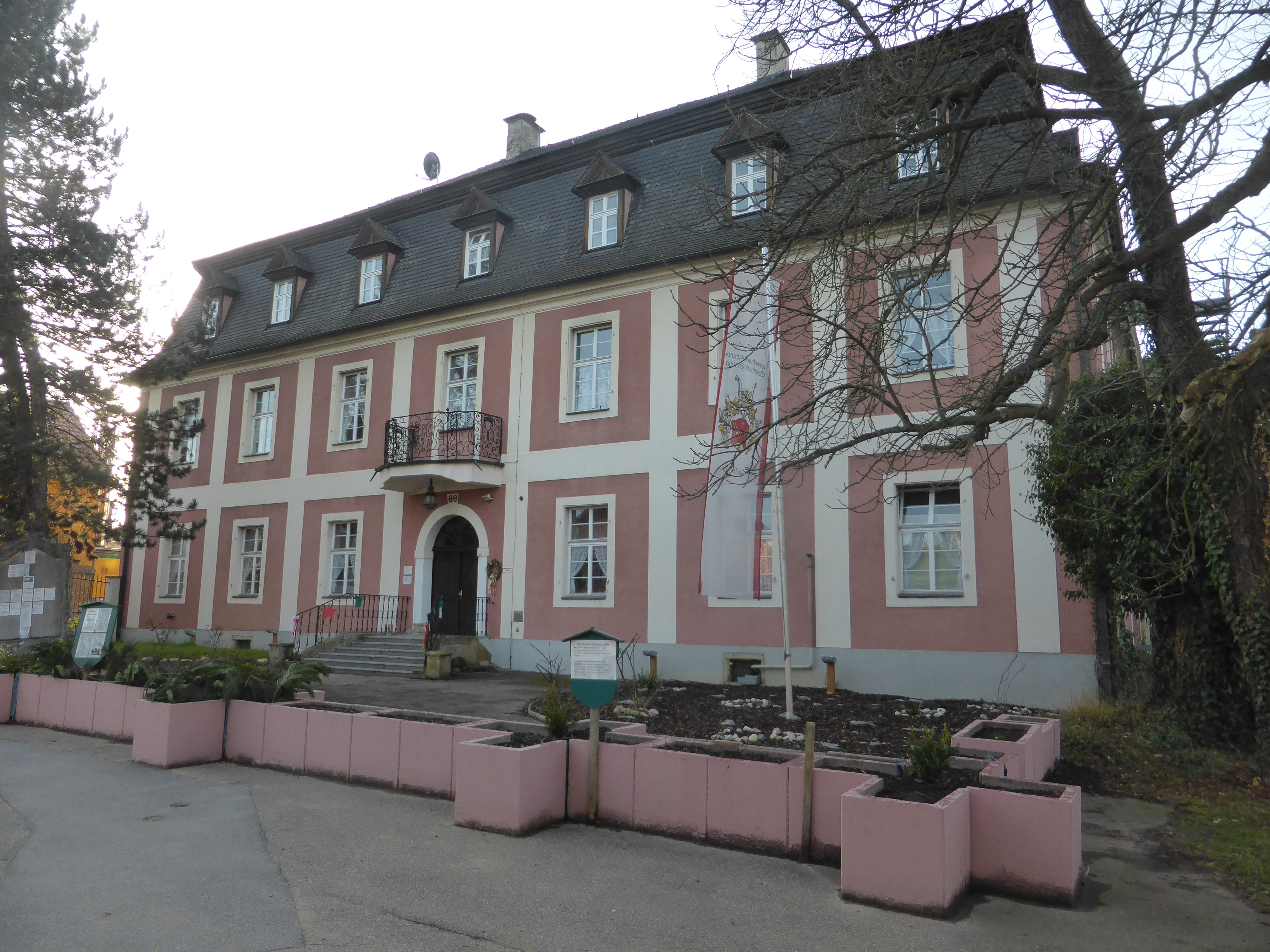 Neues Schloss Teublitz (Teublitz)